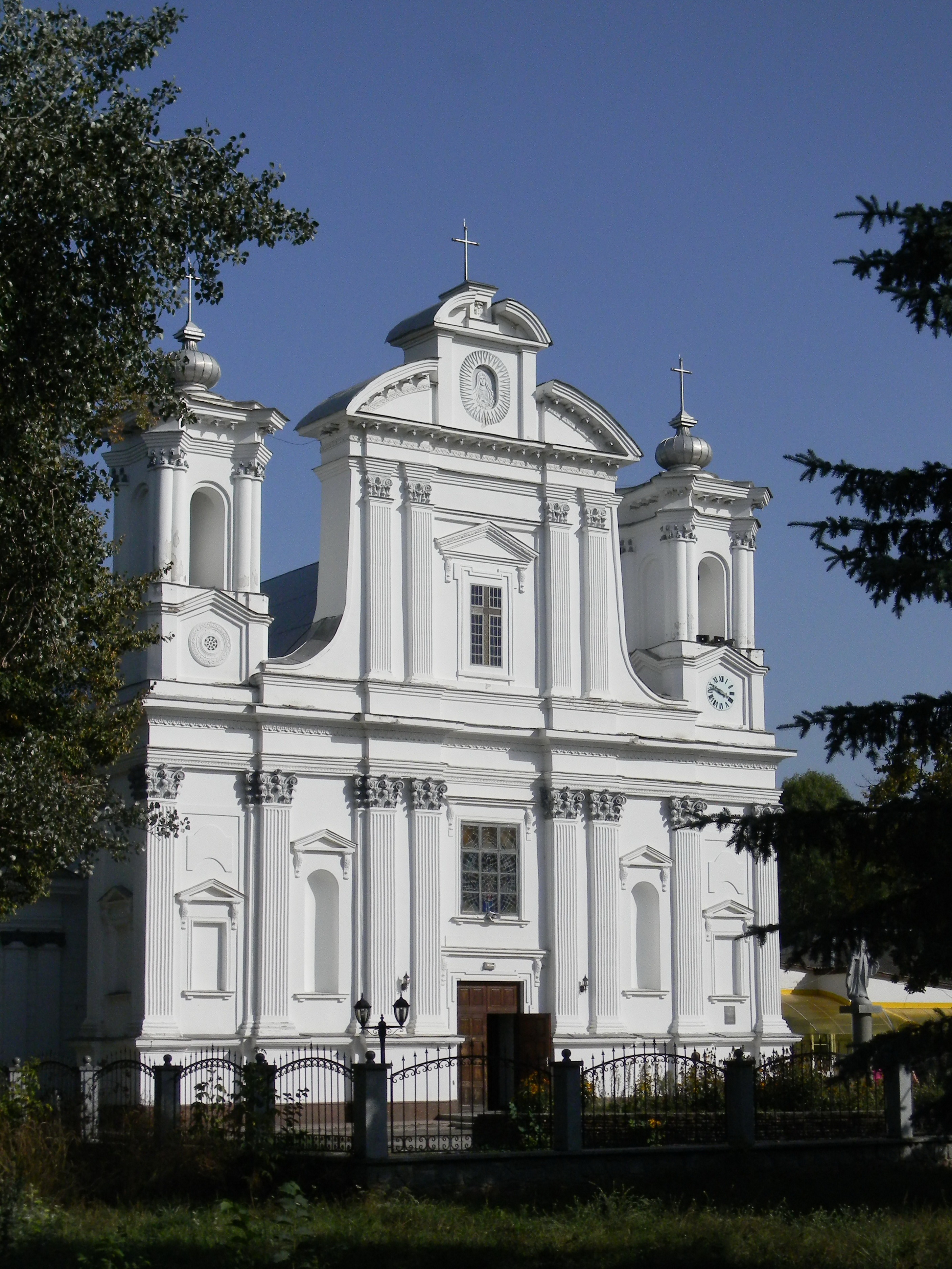 Костьол, Коростишів, вул. Дарбіняна, 7